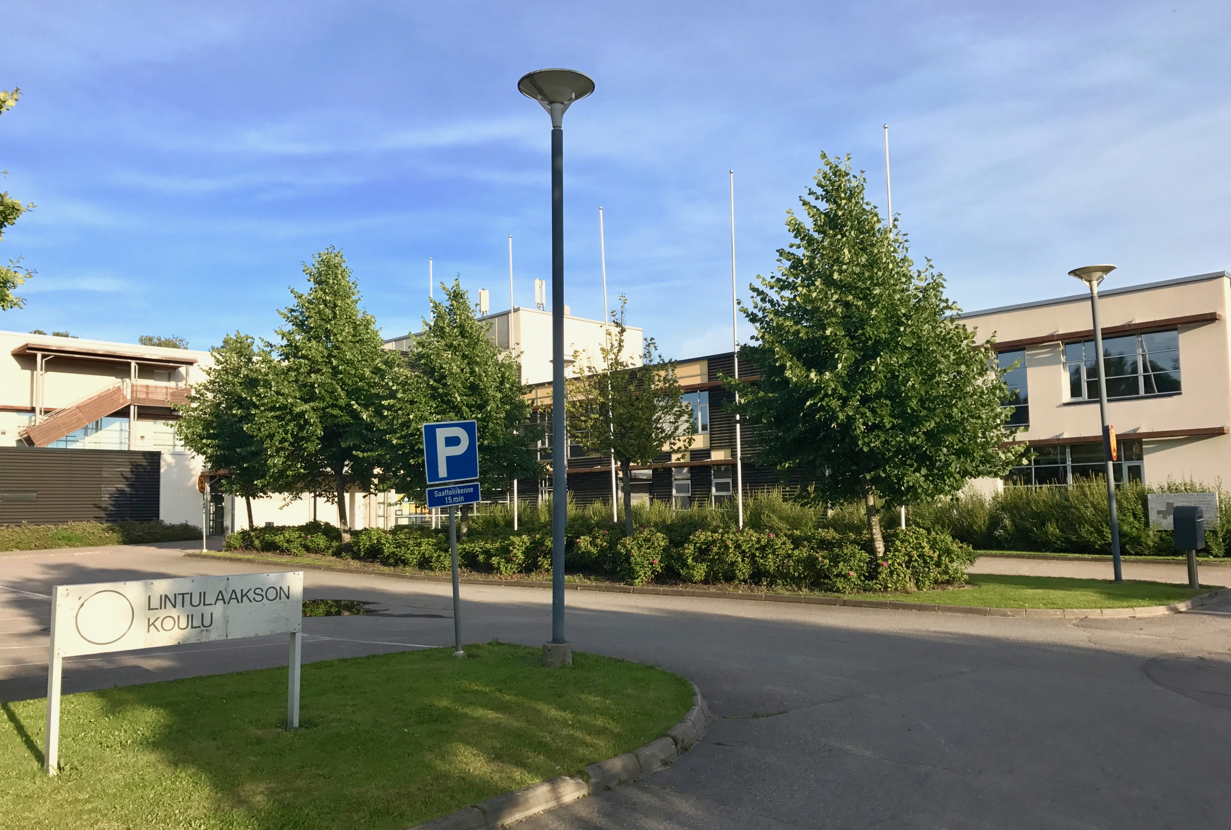 Lintulaakson koulu Espoossa